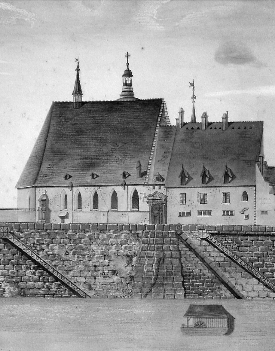 Vue générale de l'hôpital Saint Laurent à Chalon sur Saône, à l'époque Renaissance, aquarelle XIXème siècle